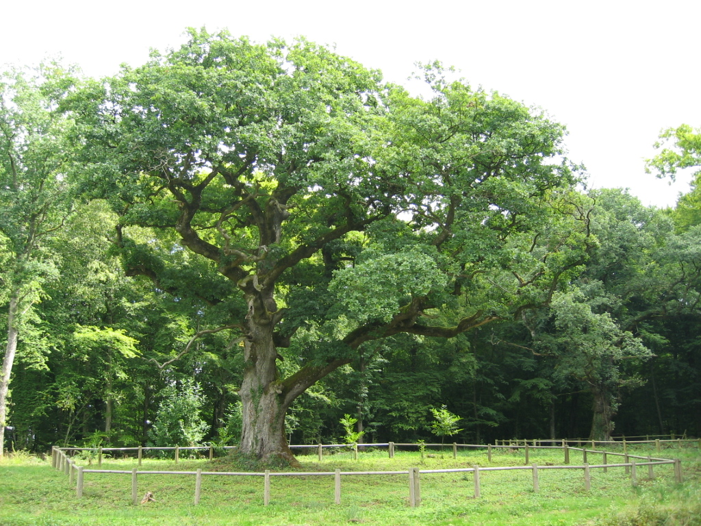 Chêne Quercus petraea de la commune de Rigney dans le Doubs agé d'environs 300 ans